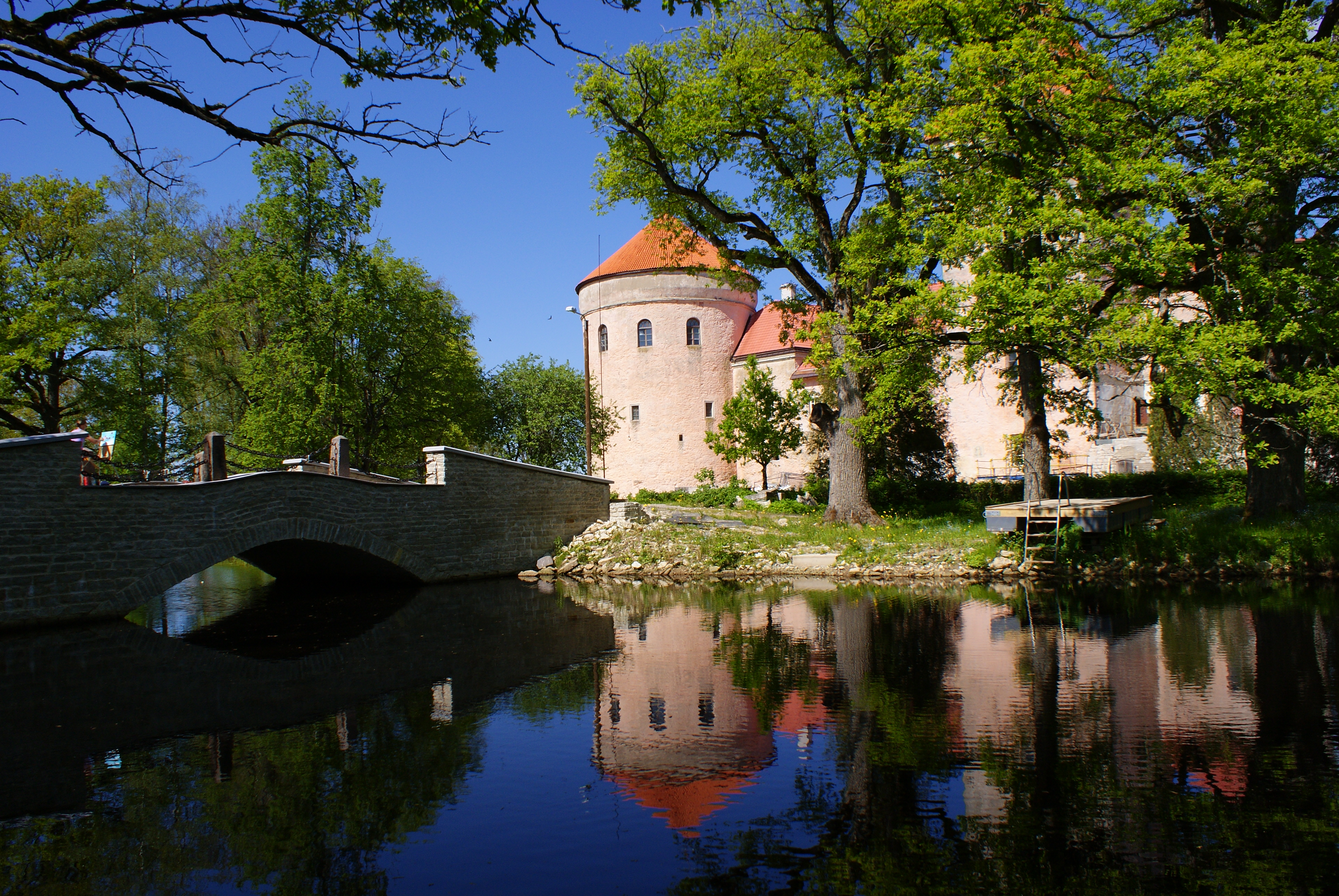 Koluvere mõisa kivisild